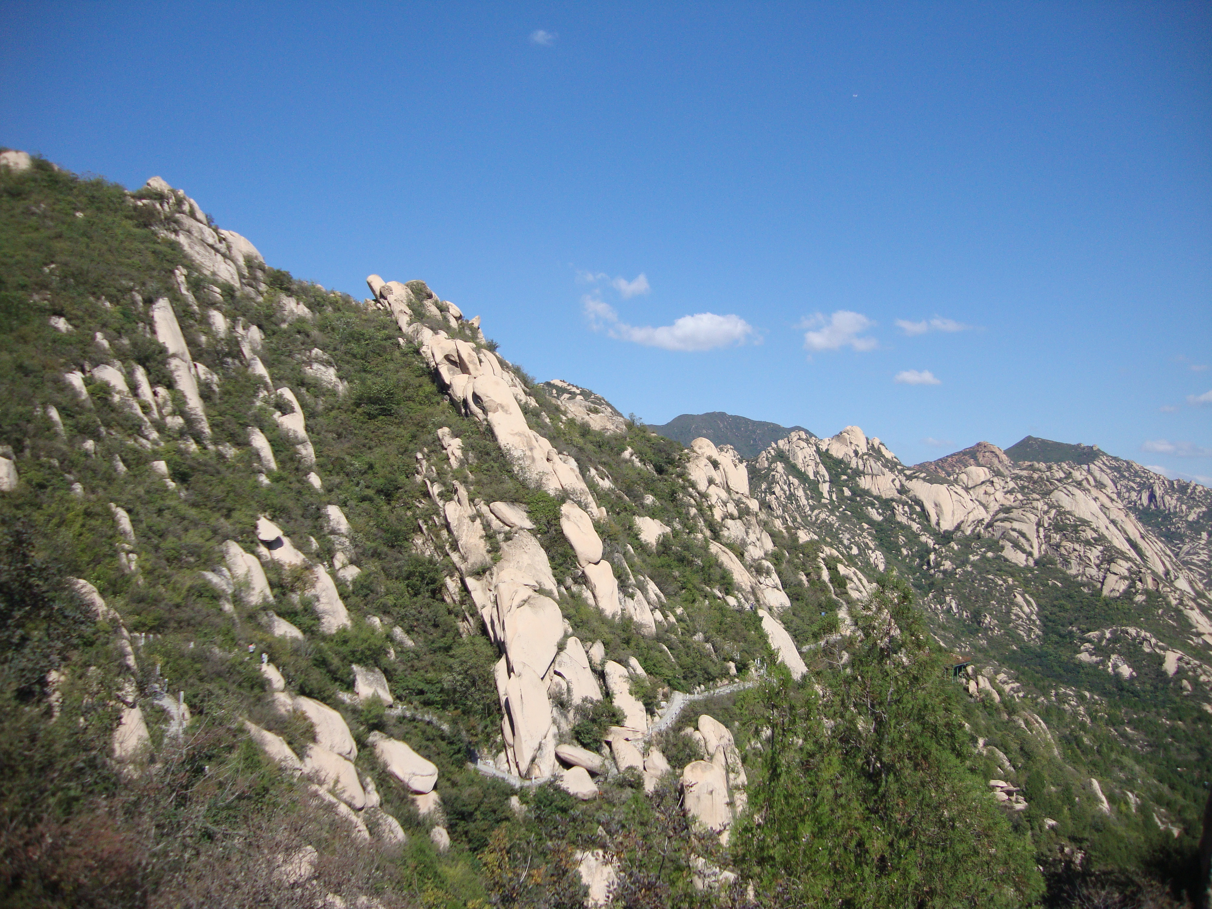 北京市凤凰岭